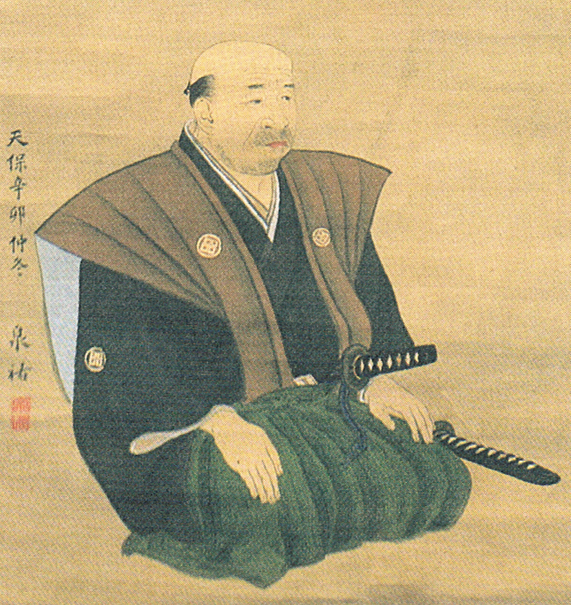 巨野泉祐筆 広瀬蒙斎像 絹本着色 白河市歴史民俗資料館蔵 天保2年